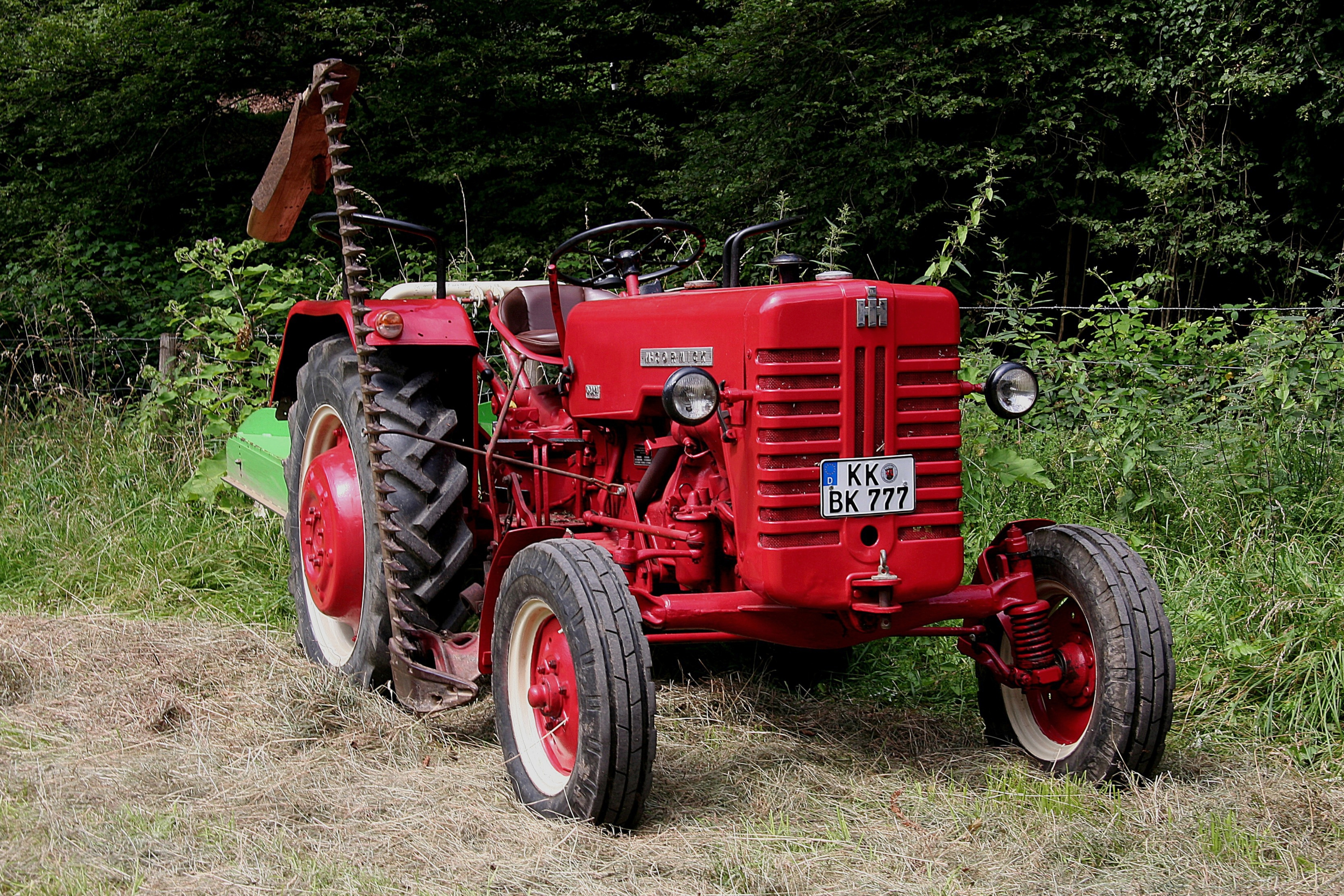 McCormick D 324 mit Mähbalken, 3-Zylinder-Dieselmotor, 1825 cm³, 24 PS; gebaut von 1956 bis 1962